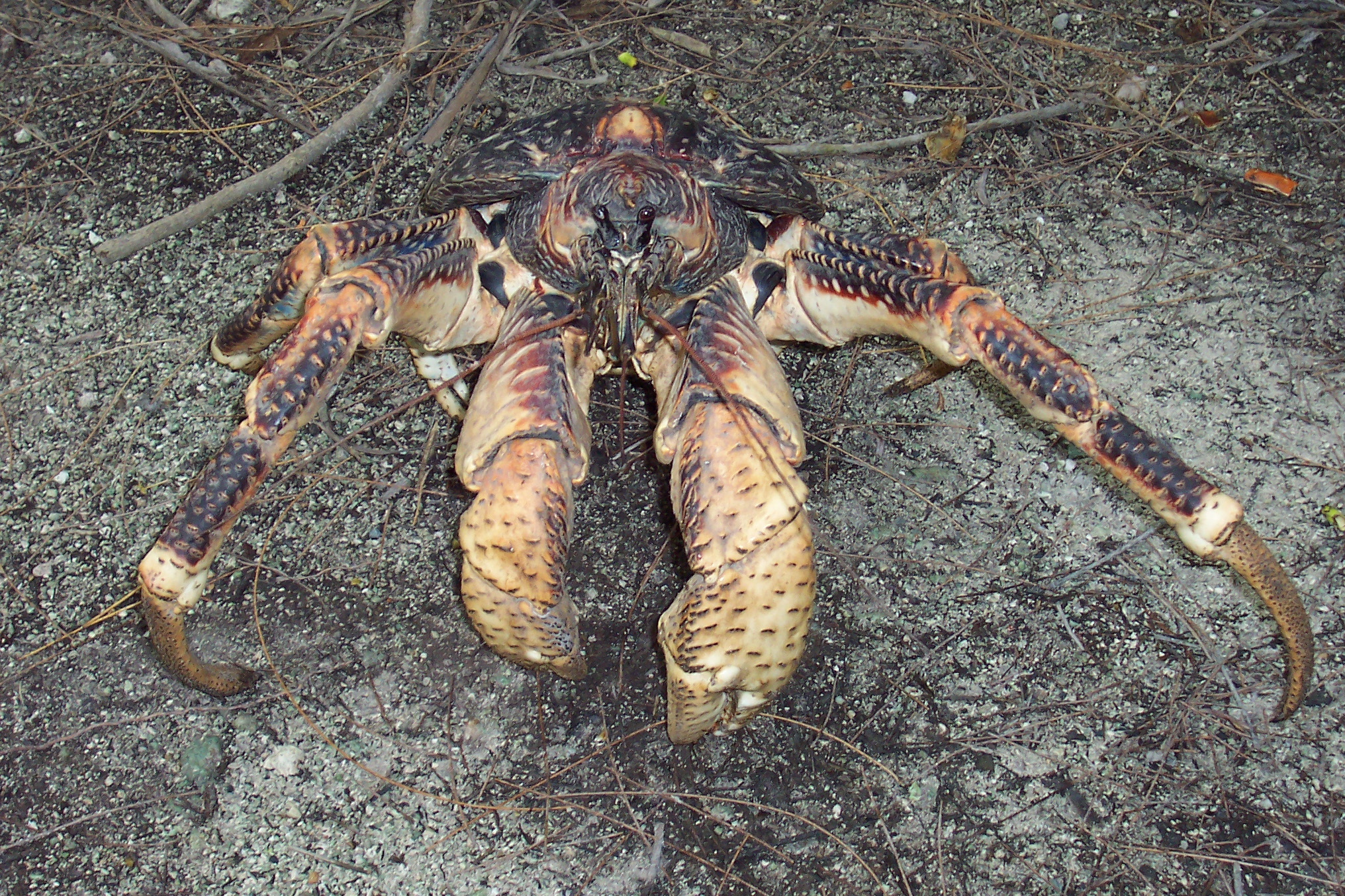 Diego Garcia B.I.O.T